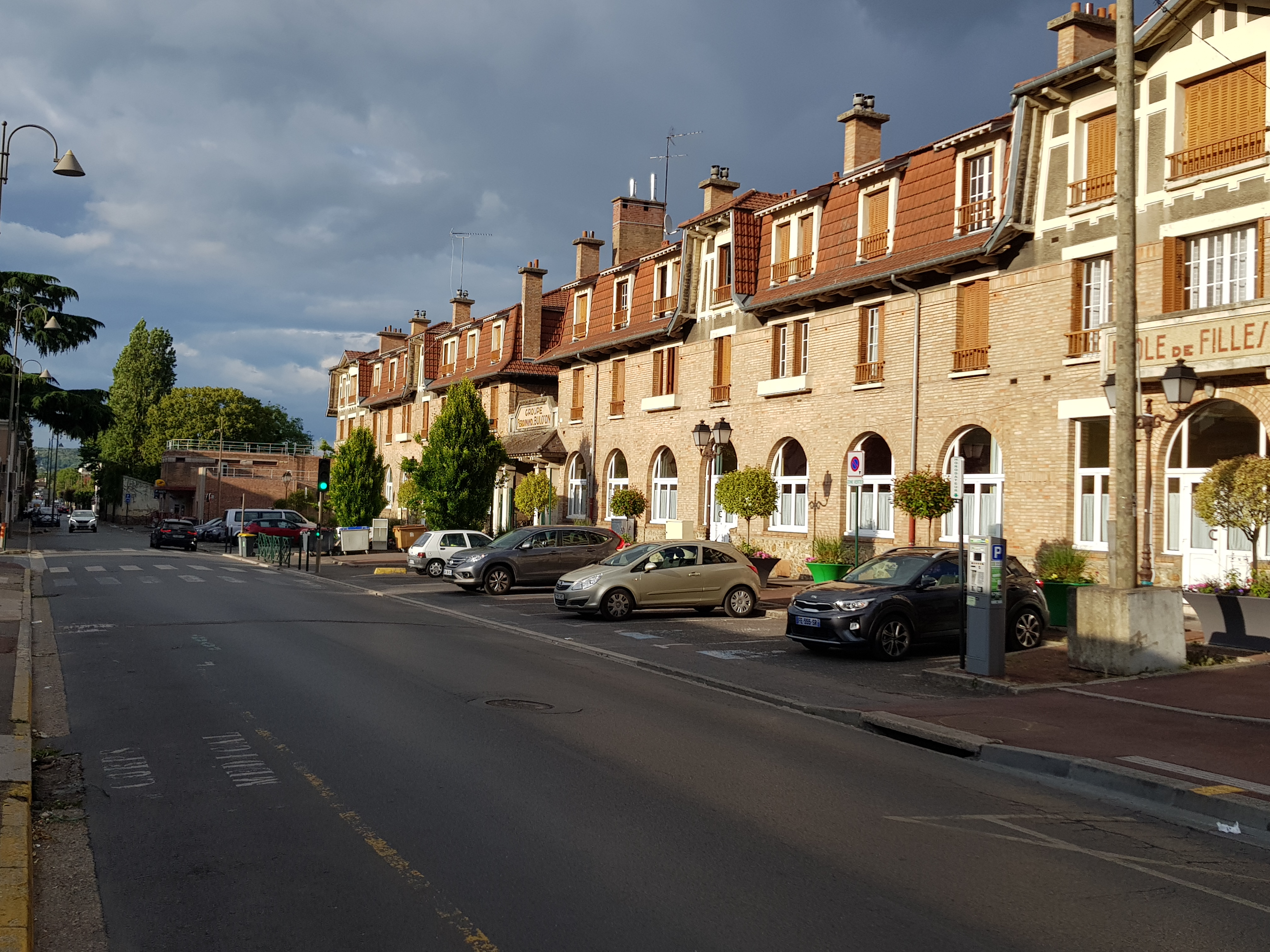 Groupe scolaire Ferdinand-Buisson, Franconville, 95 130.